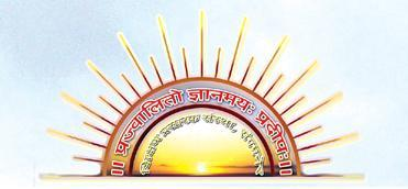 मानचिन्ह शिक्षण प्रसारक संस्था, संगमनेरमानचिन्ह शिक्षण प्रसारक संस्था, संगमनेर